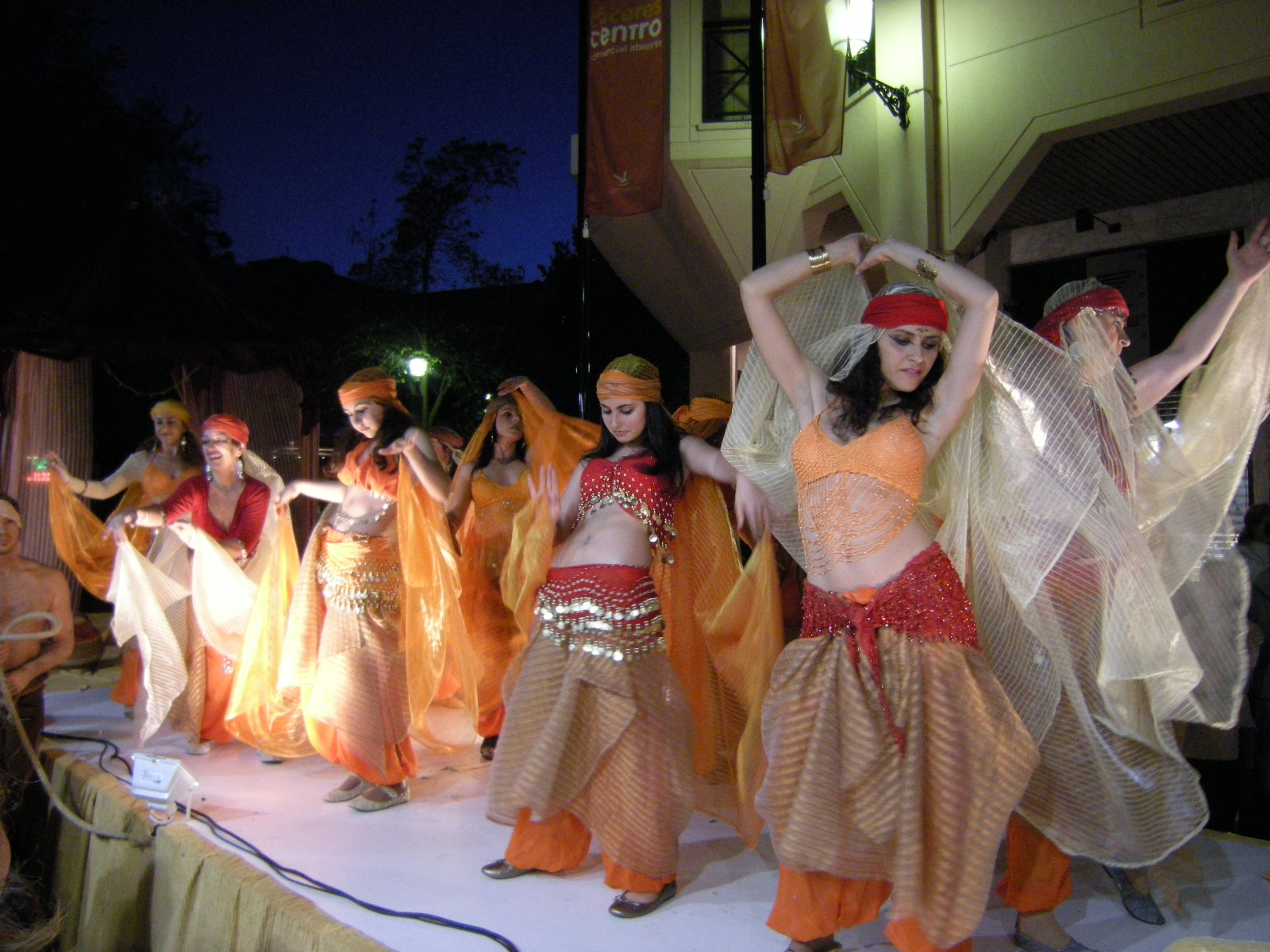 Desfile durante a Festa de São Jorge, em Cáceres